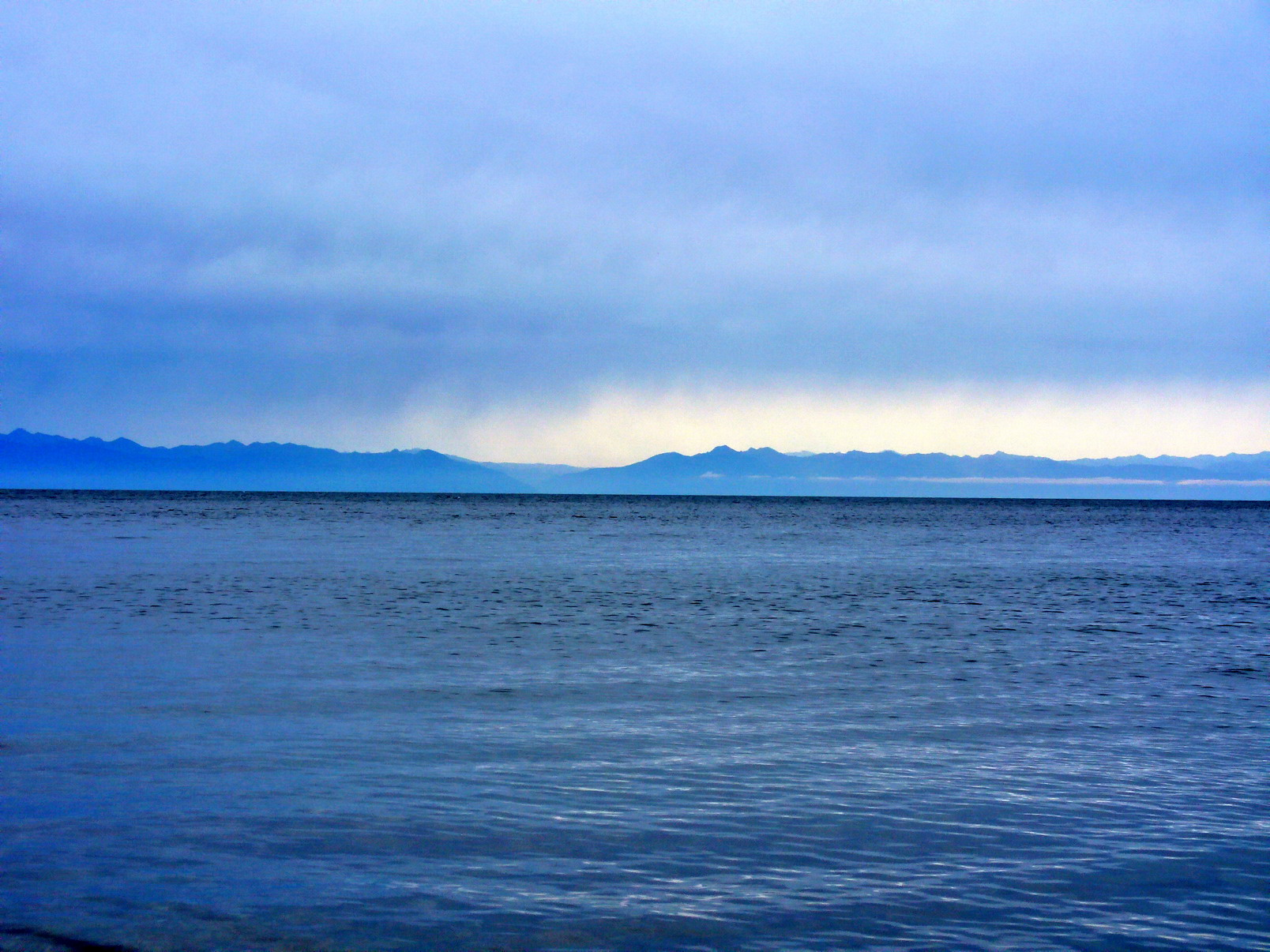 Хамар-Дабан (за Байкалом) Chamar-Daban beyond Lake Baikal.